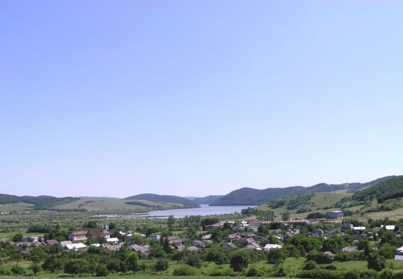 Celkový pohľad